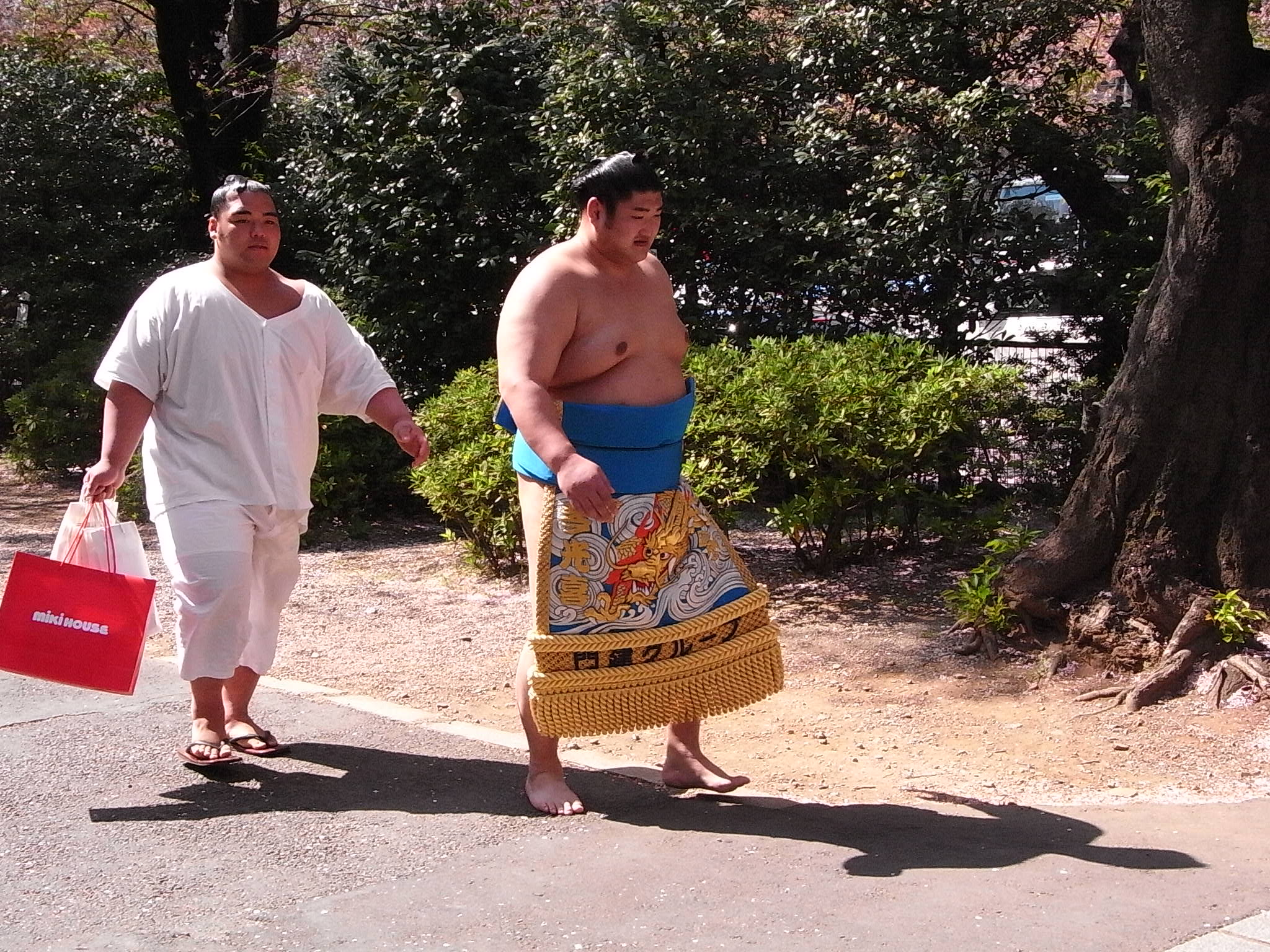 琴光喜啓司